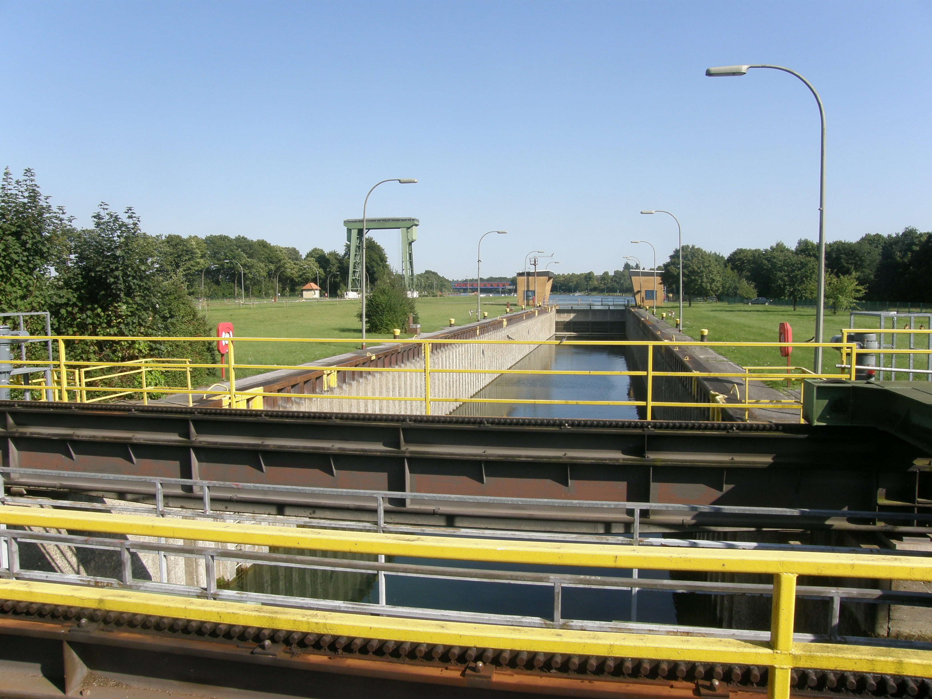 Schleuse Flaesheim am Wesel-Datteln-Kanal kleines becken, hinten links das Hubtor des großen Beckens, Blickrichtung Oberwasser